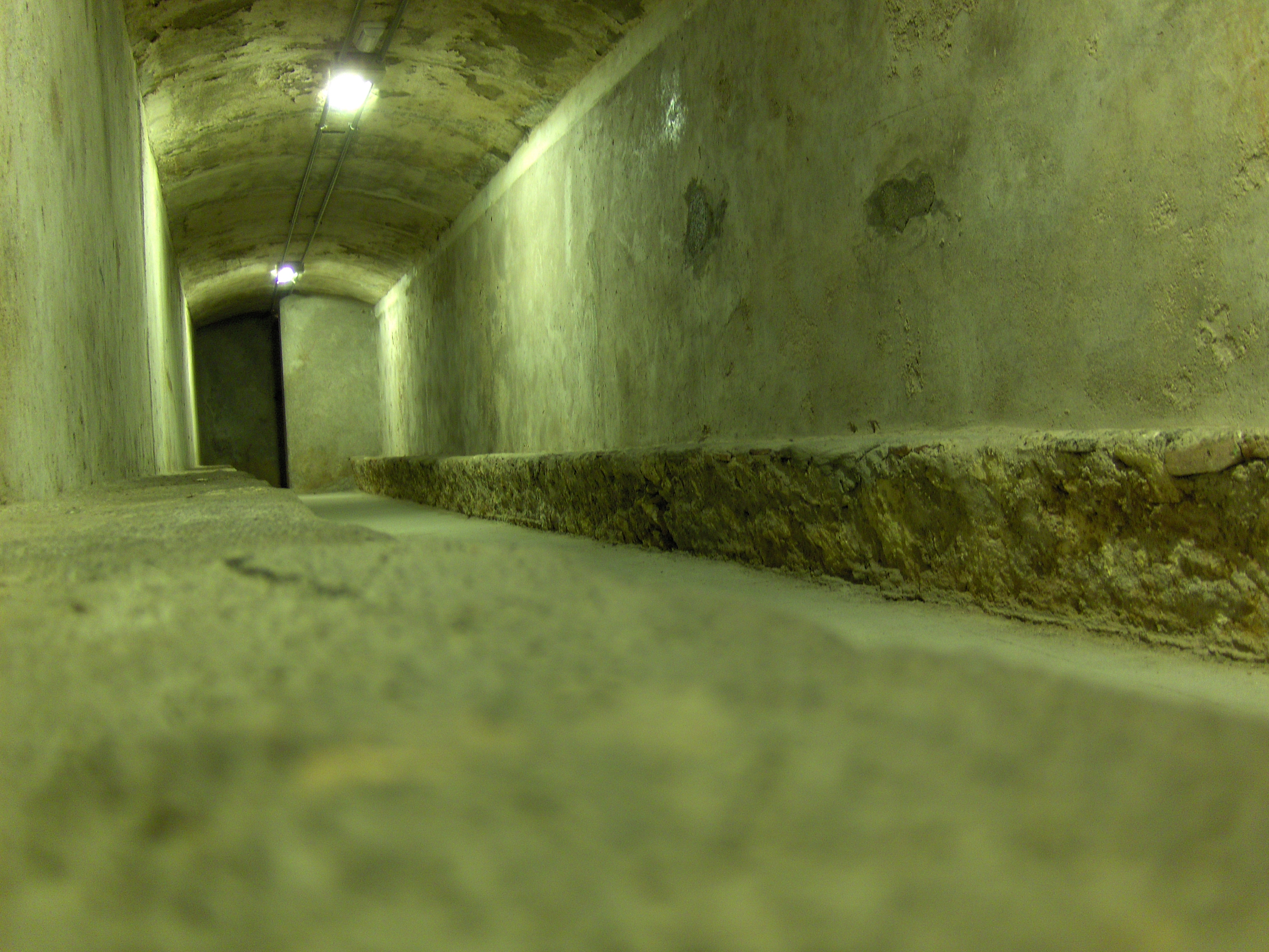 Vista desde los bancos de los refugios antiaéreos de Almería